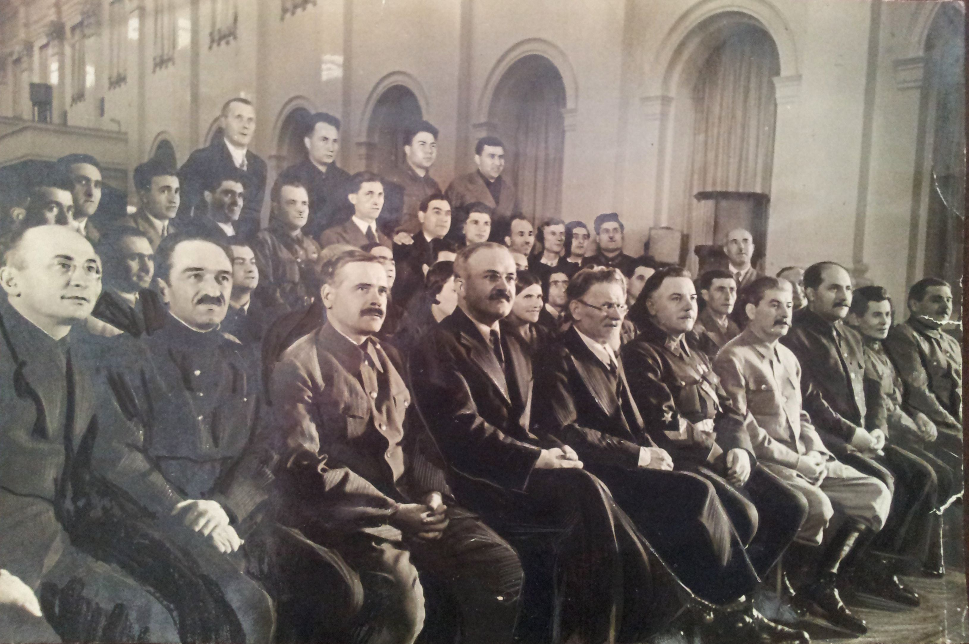 SSRİ Ali Sovetinin I çağırışının deputatları (Millətlər palatası). Azərbaycanlı deputat İskəndər Əliyev 3-cü cərgədə soldan birincidir. Birinci cərgədə Sovet İttifaqının başçılarıdır: Beriya, Mikoyan, Andreev, Molotov, Kalinin, Voroşilov, Stalin, Jdanov, Yejov.